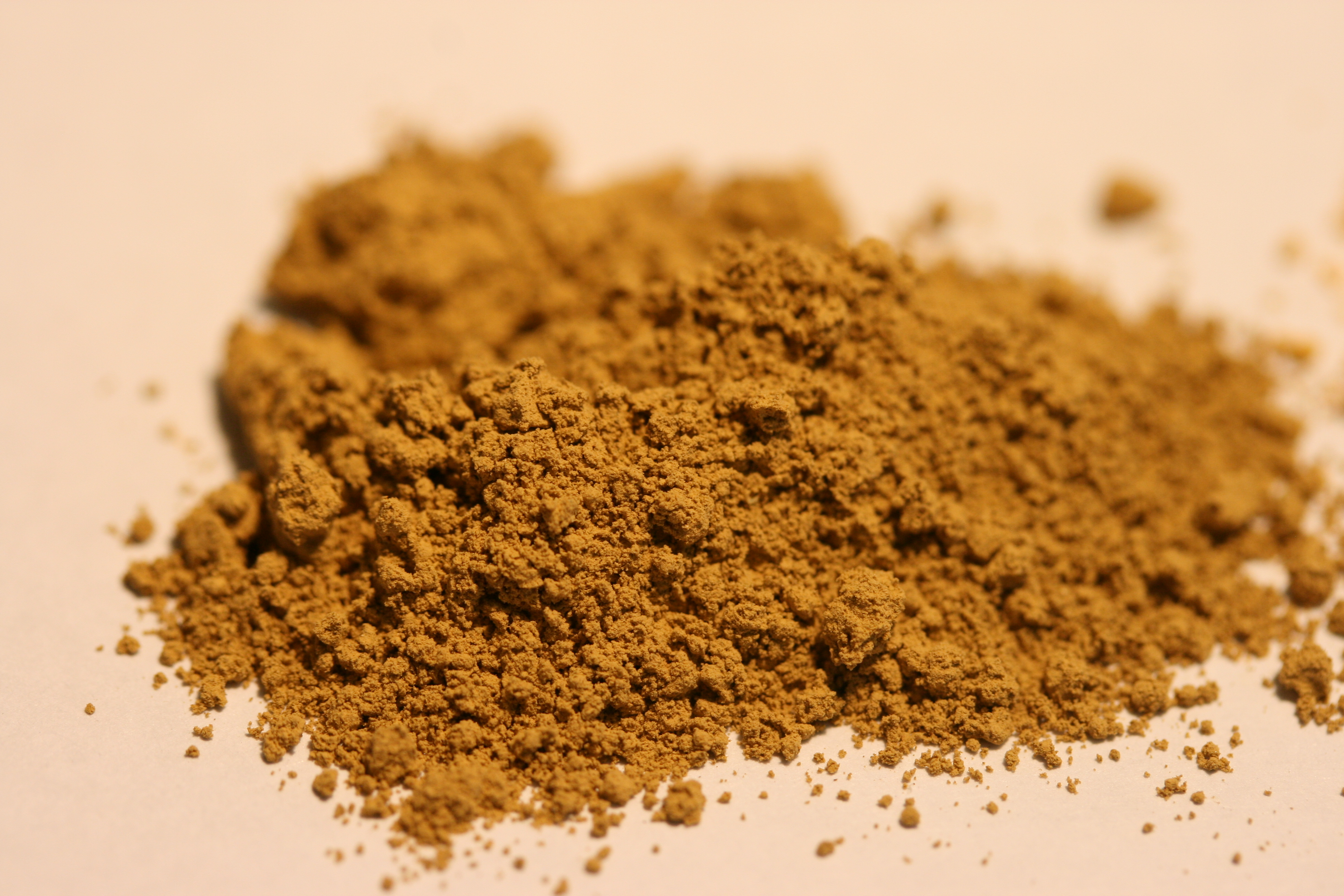 Hellocker- Pigment